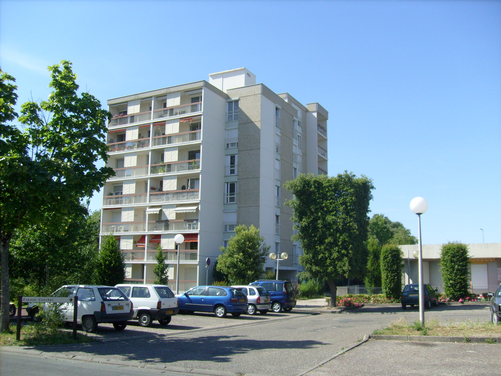 Immeuble du quartier des Boiffiers à Saintes